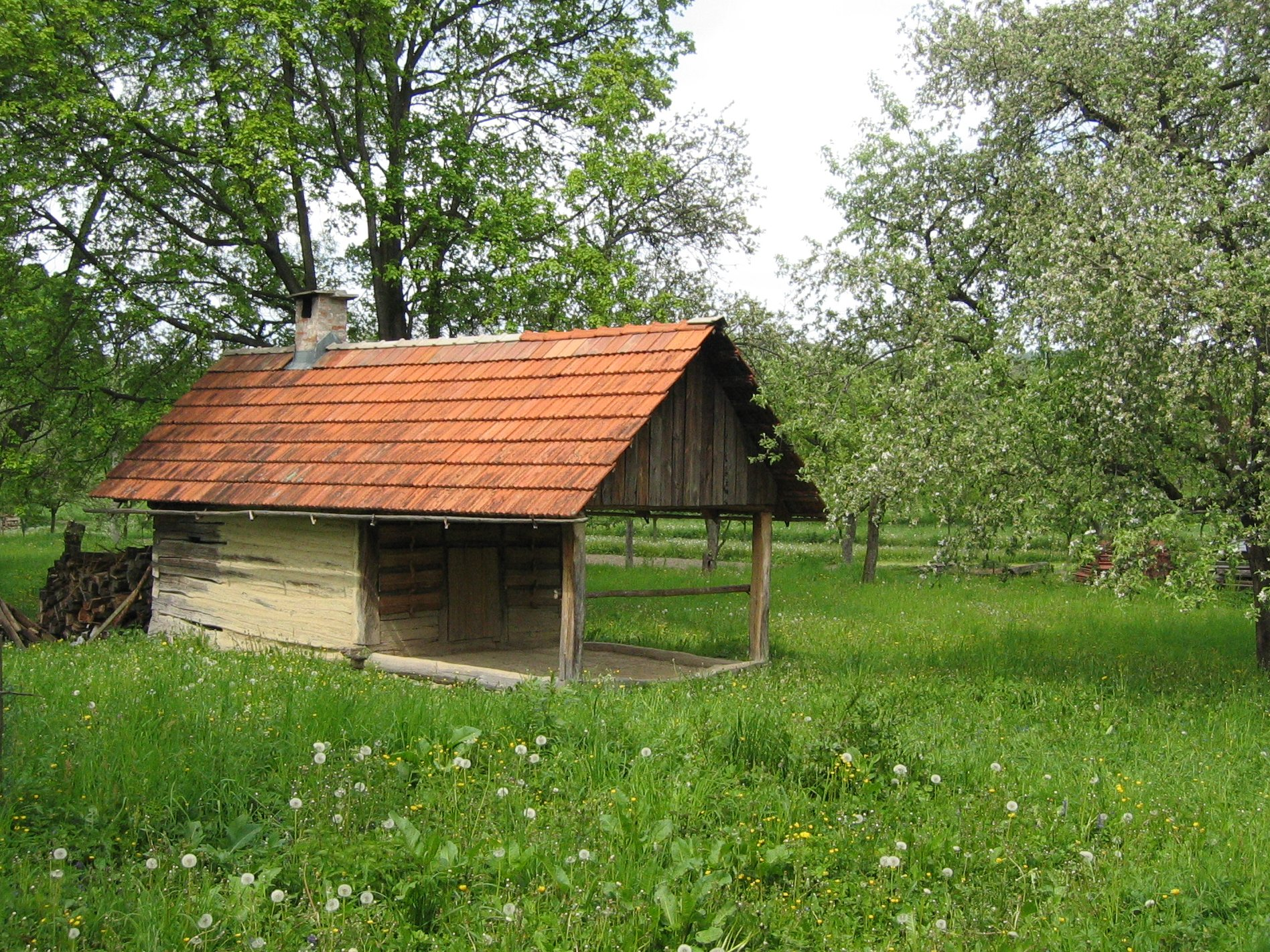 Chmelova sušírna ovoce v Hostětíně